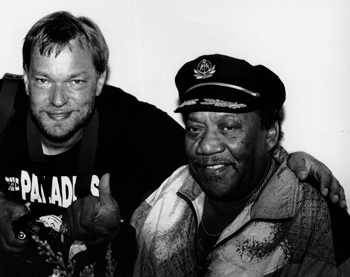 Rien en Marion Wisse en Bobby "Blue" Bland (1994)